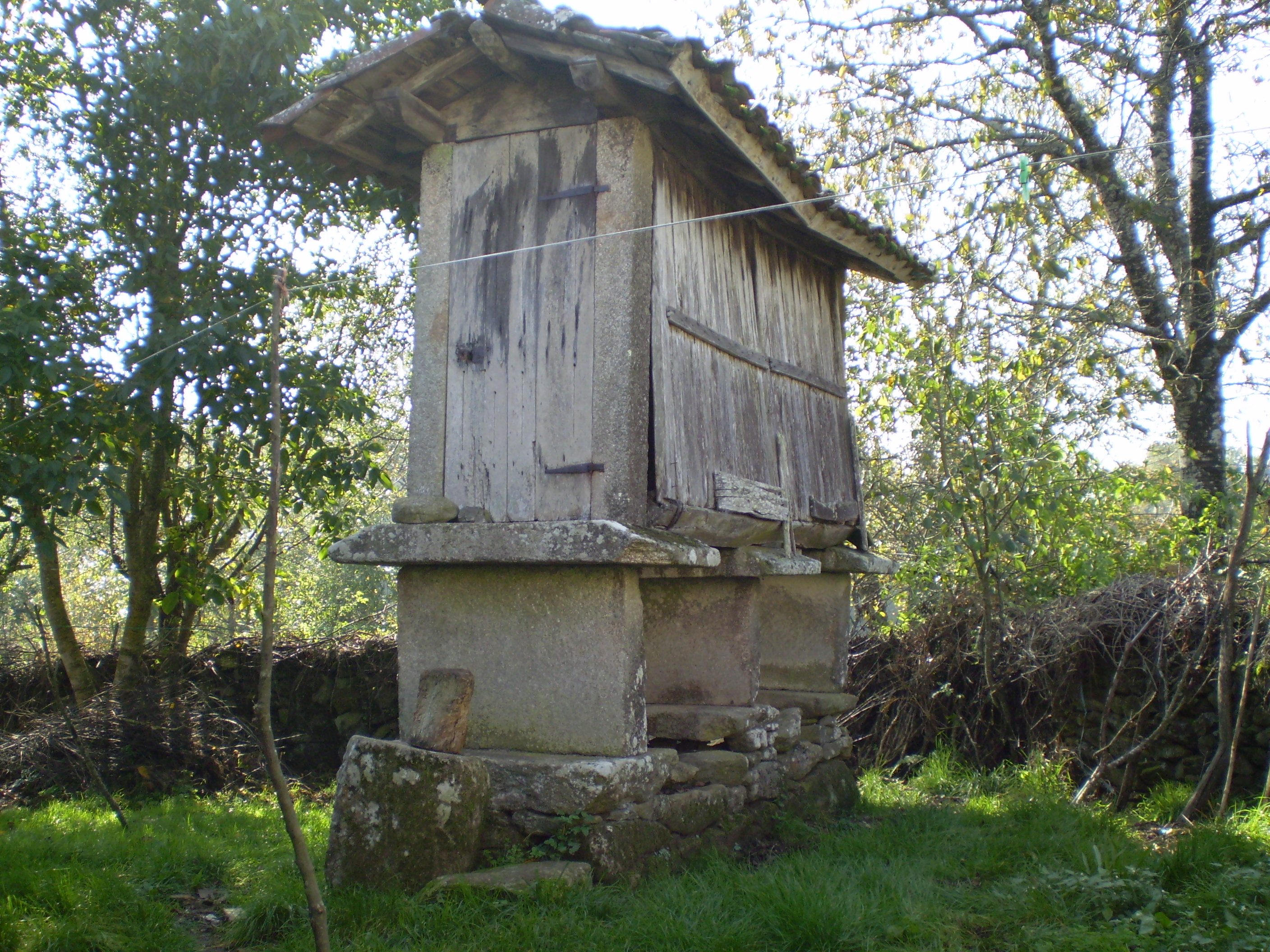 Hórreo en Cutián (Antas de Ulla)